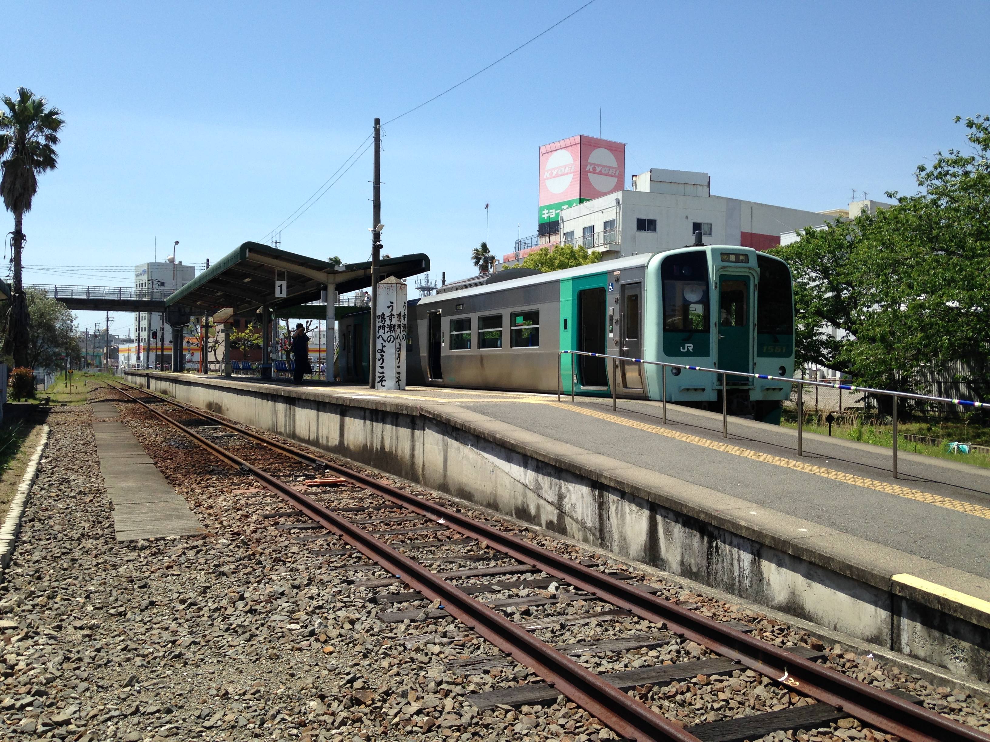 鳴門駅のホーム